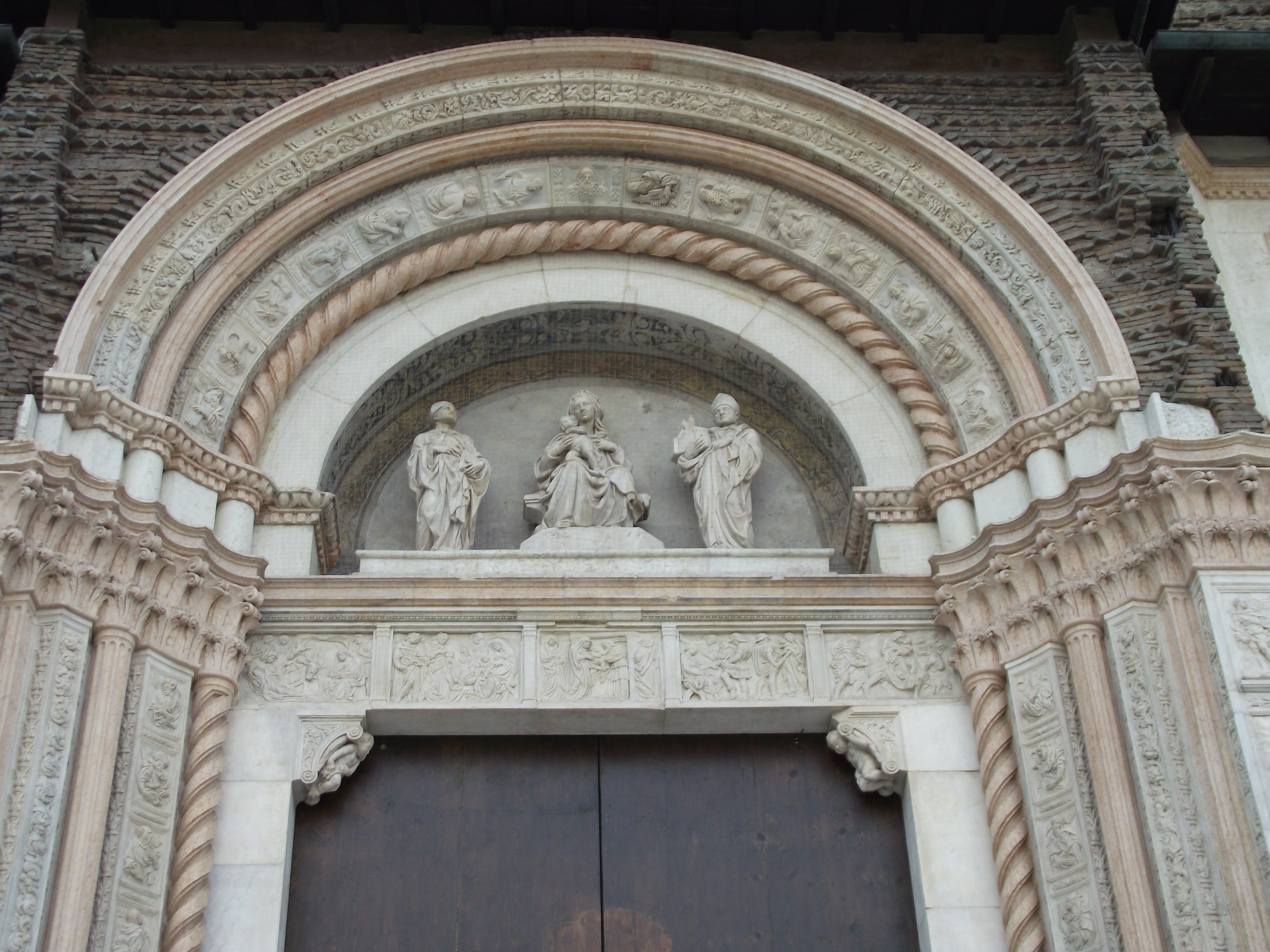 Bologna, Basilica di San Petronio, 1390-XVII secolo